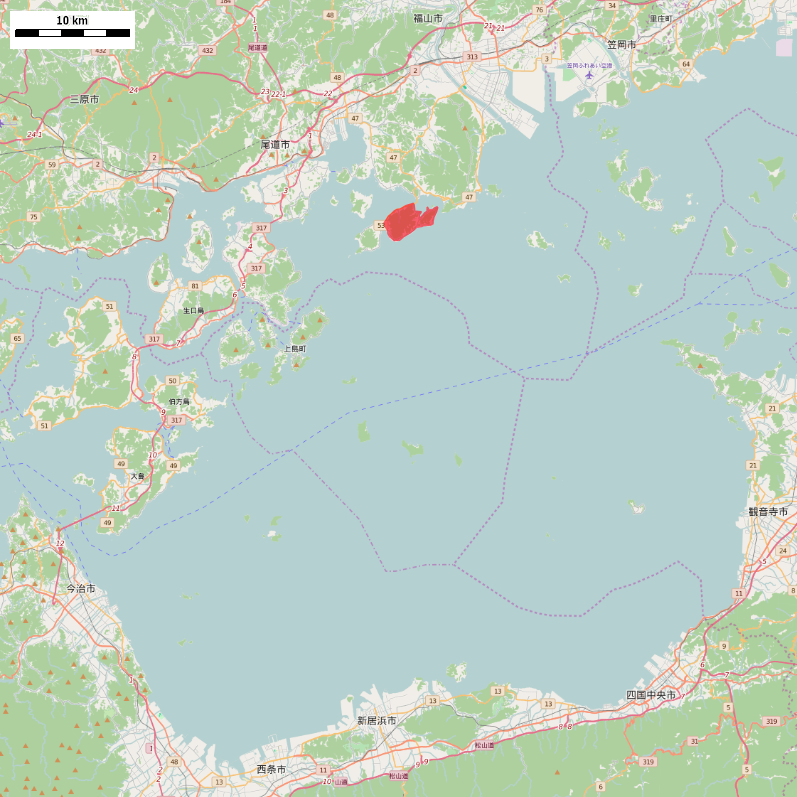 広島県福山市内海町の田島周辺 This map may be incomplete, and may contain errors. Don't rely solely on it for navigation.